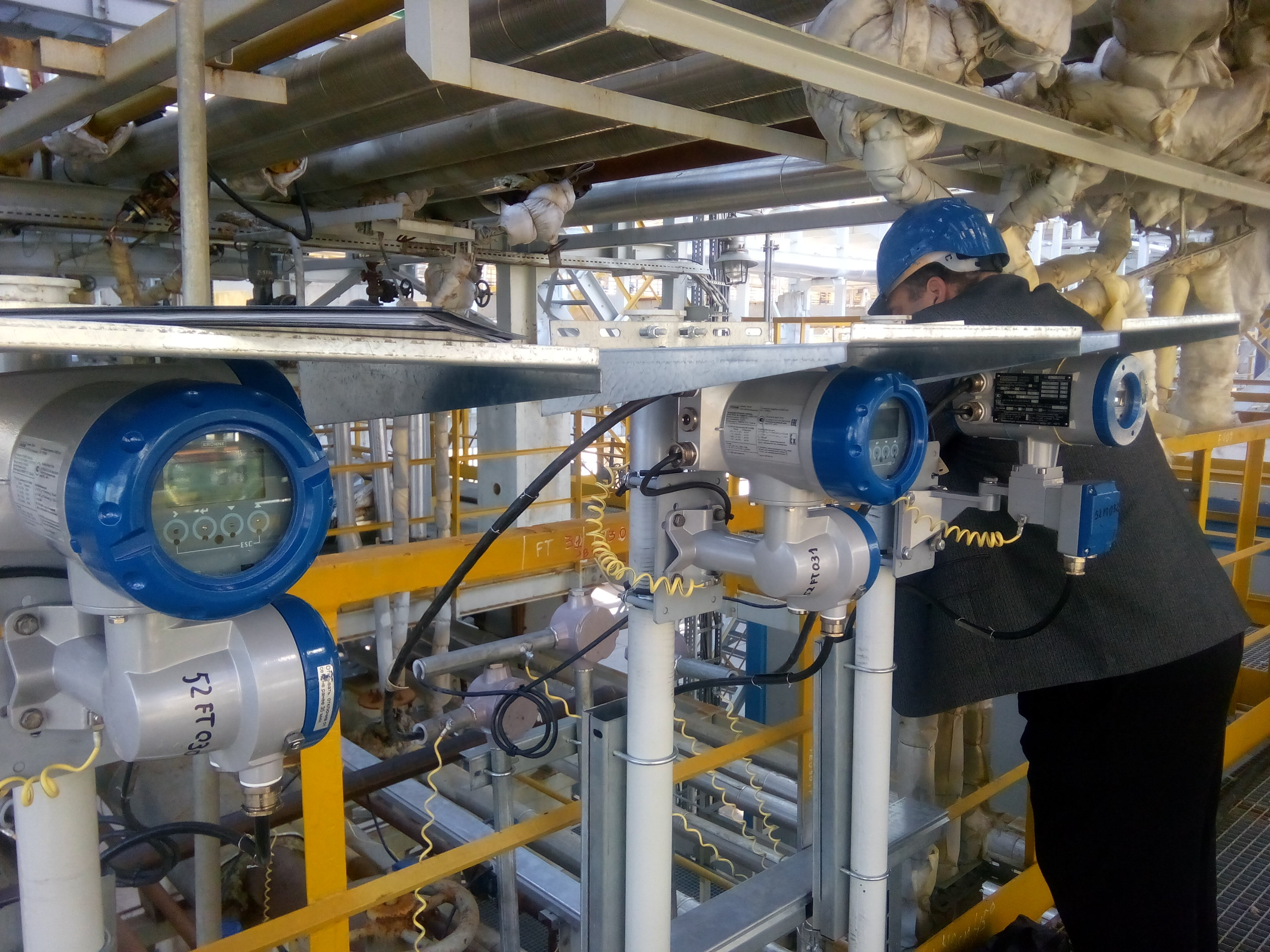 Измерение расхода водорода на установке висбрекинга ультразвуковыми расходомерам